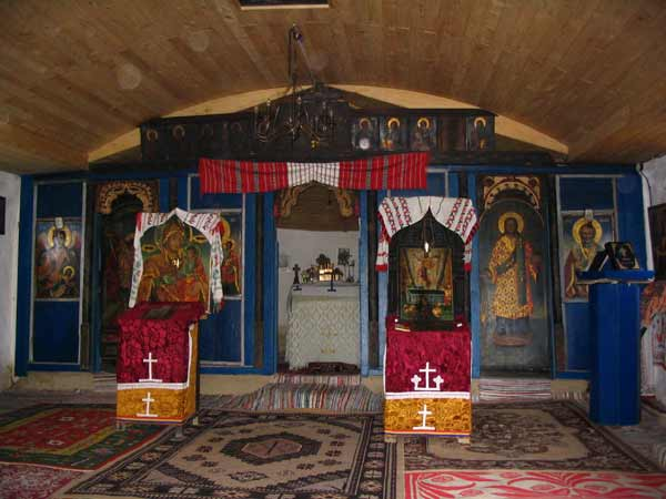 Iconostasul bisericii din Izvoarele, Constanţa, după restaurare. Foto: Vlad Calboreanu 2001.